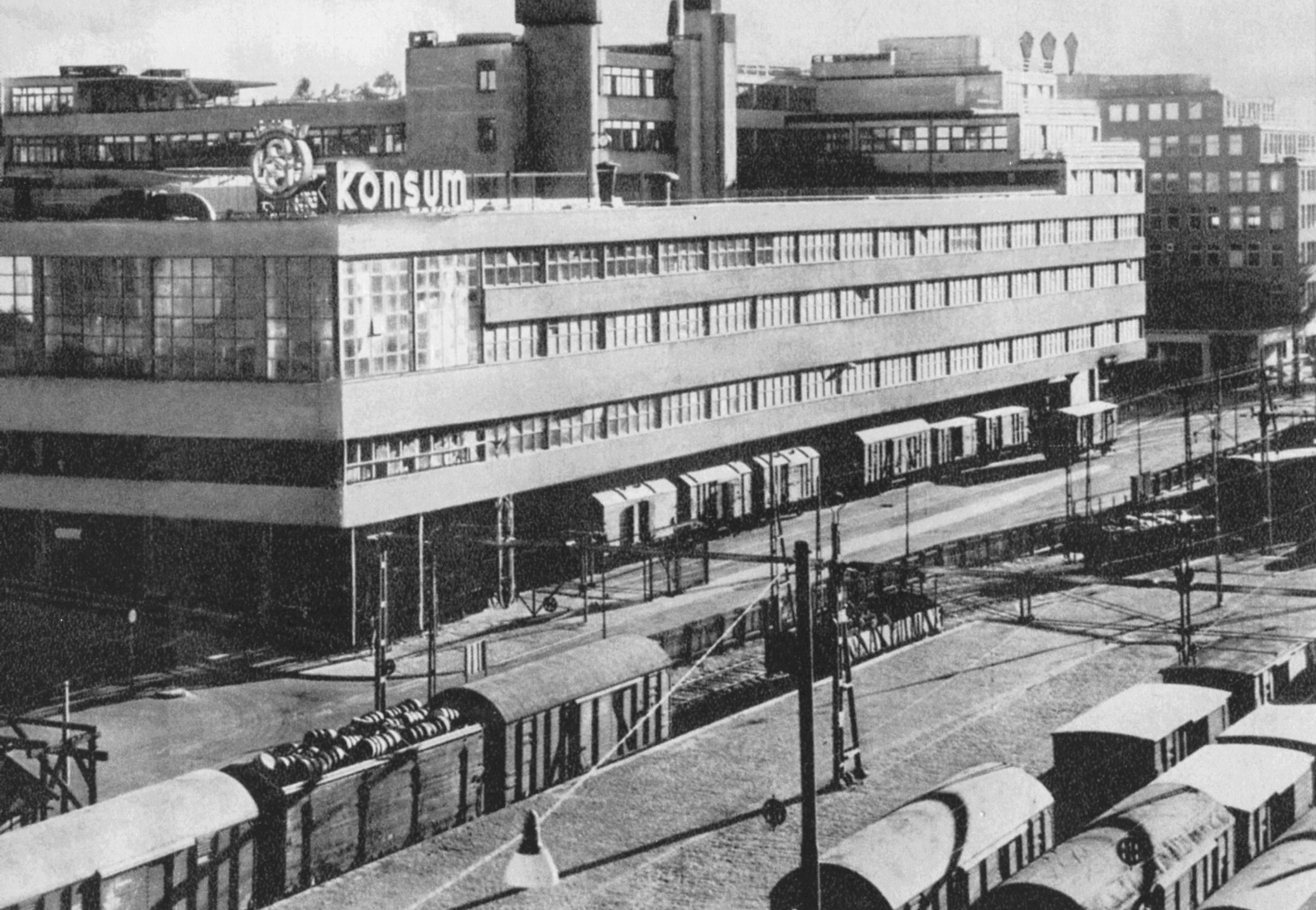 KF:s centrallager vid Folkungagatan, arkitekt Eskil Sundahl och Eric Rockström från KFAI.